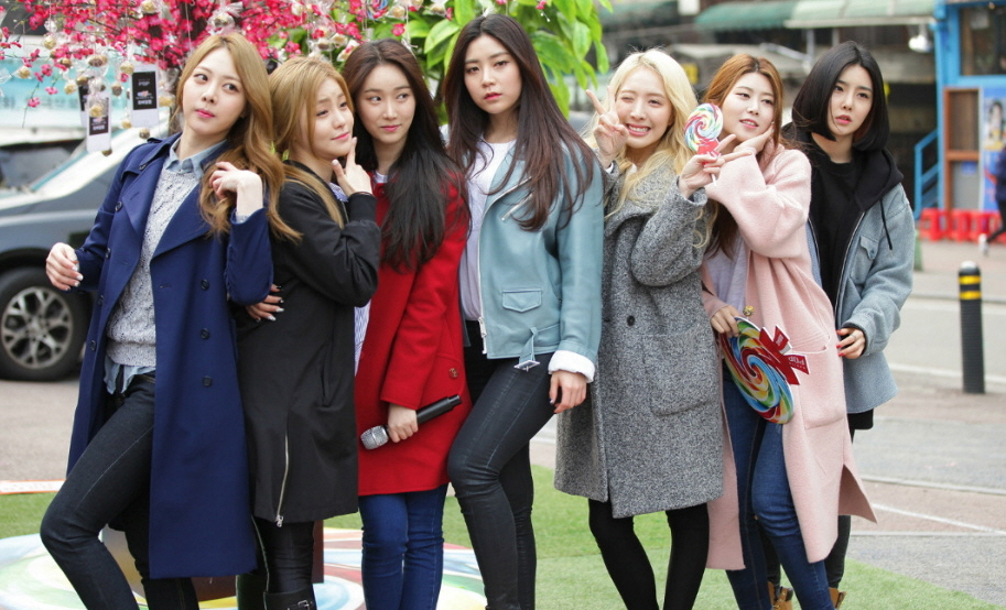 브레이브걸스(Brave Girls) 홍대 모바일팝 화이트데이 이벤트